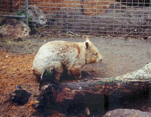 Zuidelijke breedneuswombat (Lasiorhinus latifrons) in Gorge Wildlife Park, Cudlee Creek, Zuid-Australië. Eigen werk.